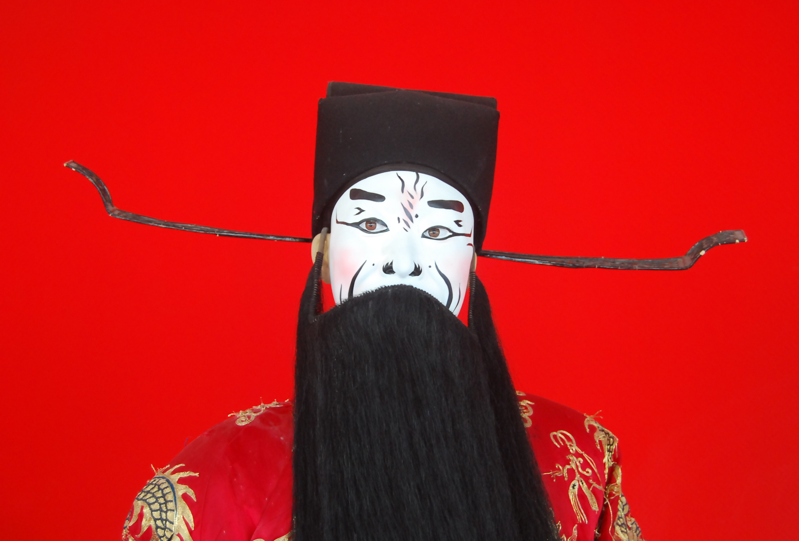 京剧中曹操的扮相，于北京梅兰芳大剧院